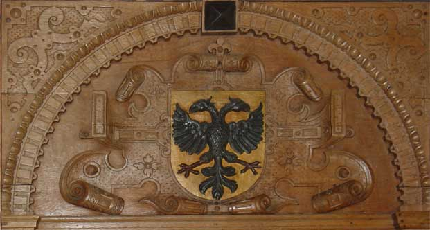 Fragment van het houtsnijwerk in de raadszaal van het gemeentehuis van Bolsward door Japick Gysberts